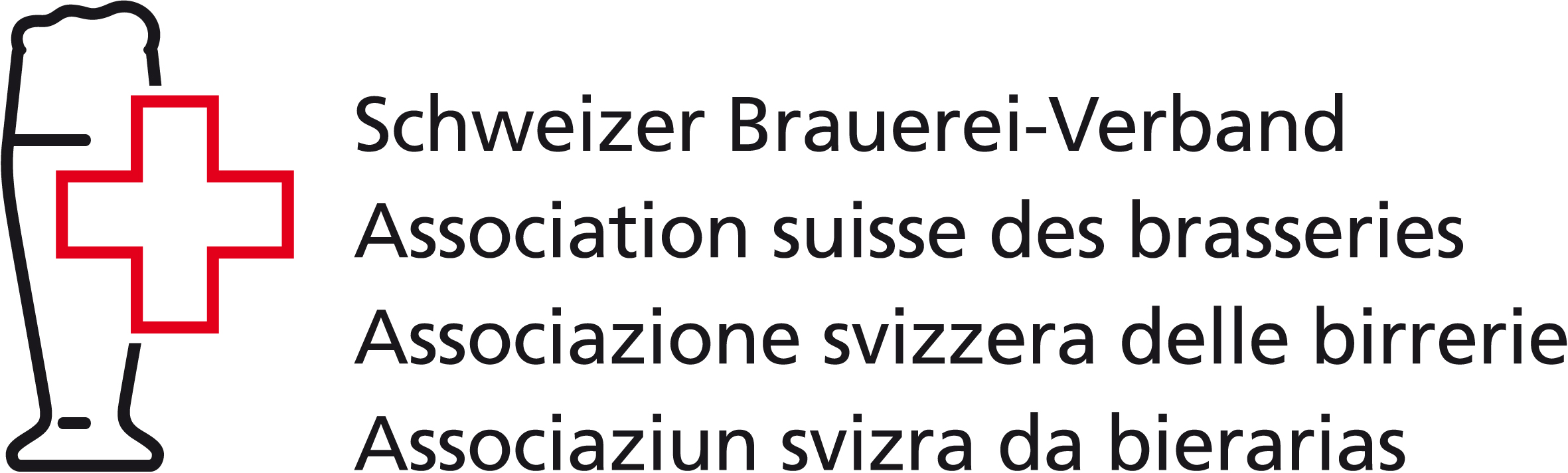 Logo des Schweizer Brauerei-Verbandes, welches seit 2009 in dieser Art verwendet wird.